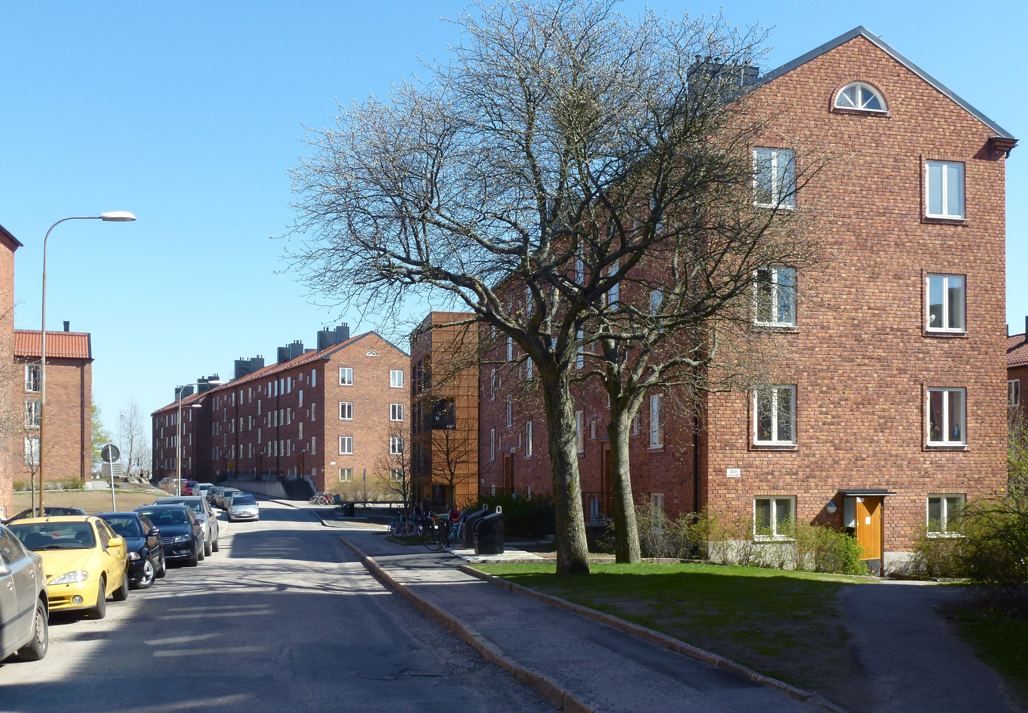 Barnrikehusen vid Främlingsvägen i Midsommarkransen, arkitekt Ernst Hawerman och Nils G:son Friberg